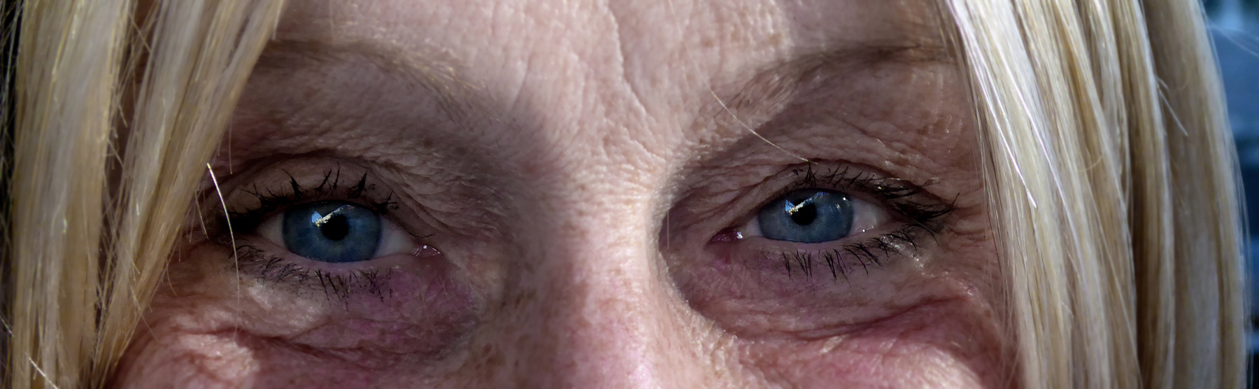 En kvinnas blå ögon.